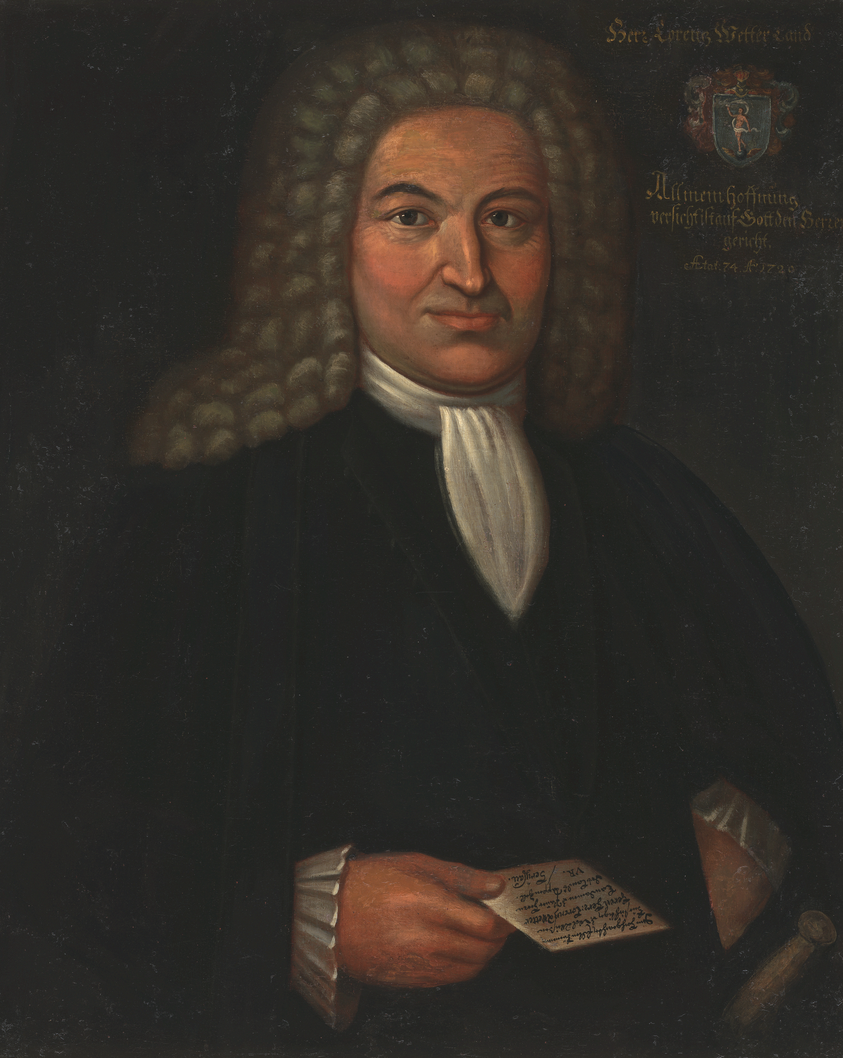 19. Landammann von Appenzell Ausserrhoden, Brustbildnis